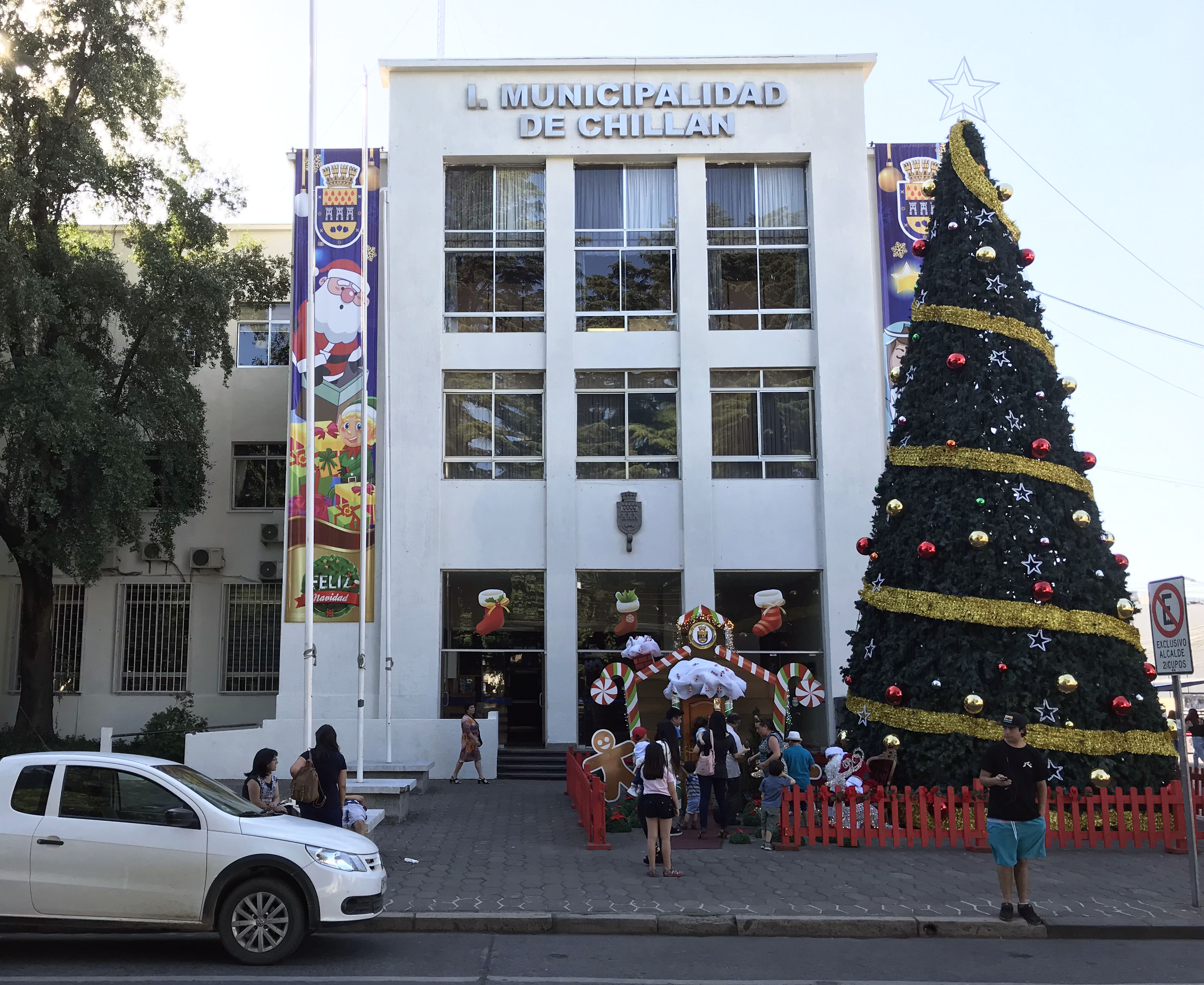 Municipalidad de Chillán, diciembre de 2018.